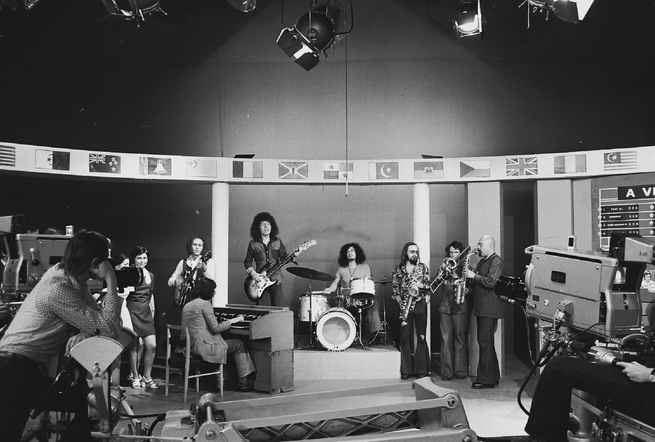 az MTV stúdiójában a Bergendy együttes. Location: Hungary, Budapest V. Tags: Hungarian TV, Budapest Title: az MTV stúdiójában a Bergendy együttes.